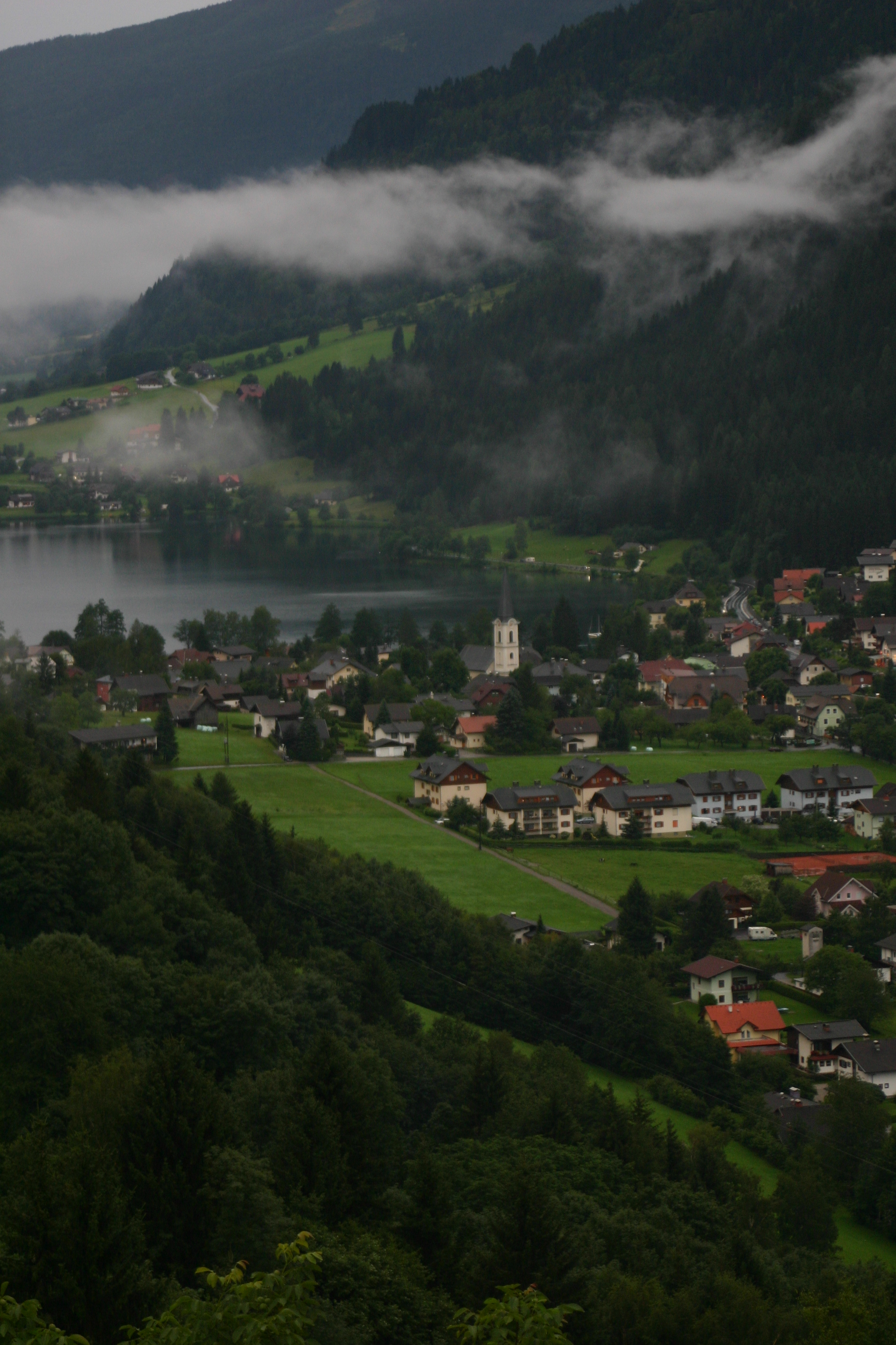 Feld am See, Blick vom Klamberg